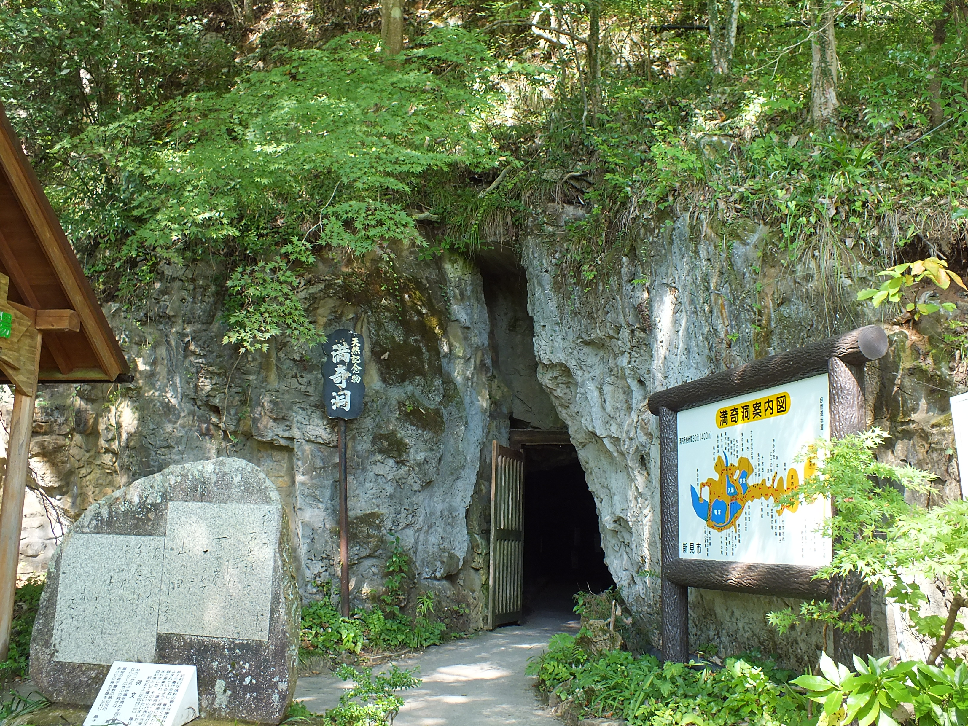 満奇洞